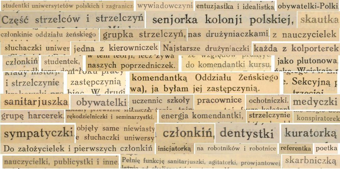 Feminatywy pochodzące z oryginalnych wydań książek: "Wierna służba. Wspomnienia uczestniczek walk o niepodległość,1910 - 1915" oraz "Służba ojczyźnie. Wspomnienia uczestniczek walk o niepodległość, 1915-1918" pod red. Aleksandry Piłsudskiej